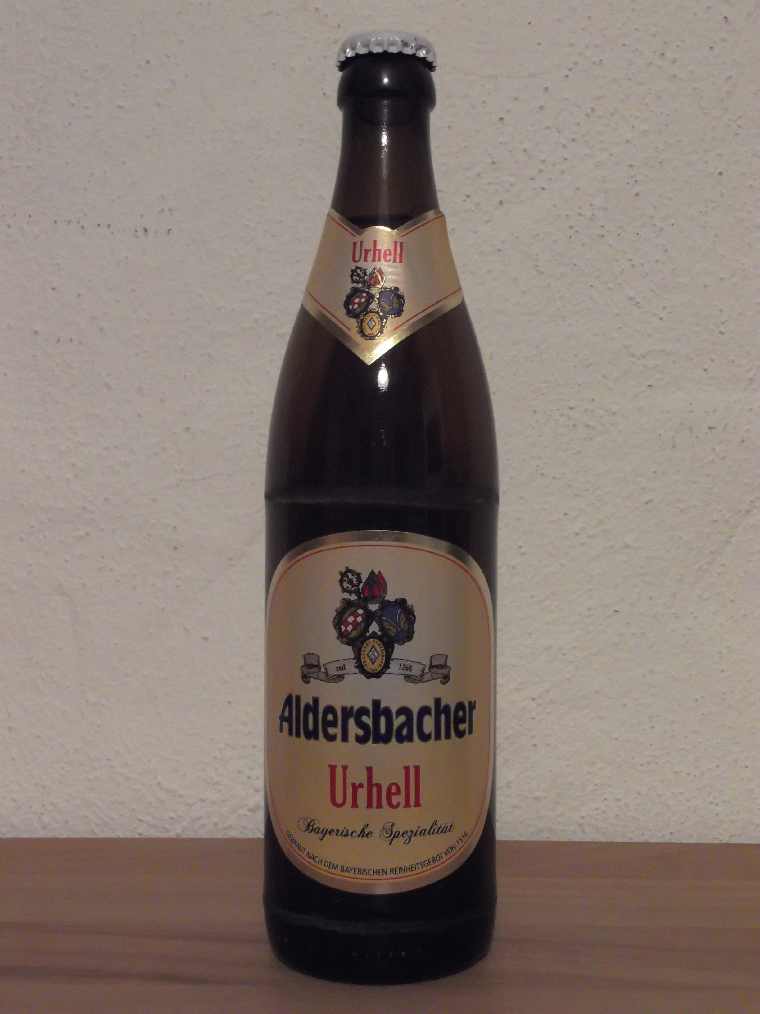 Flaschenabfüllung 0,5l